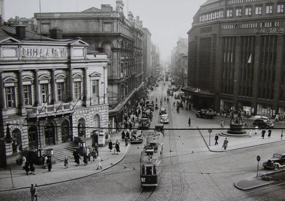 Näkymä Aleksanterinkadulle 1949–1950.